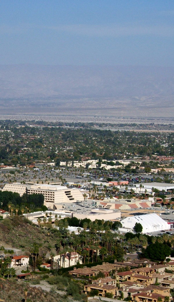 Tehtud laupäeval mäenõlvalt ning kaadrisse on jäänud esiplaanil kallimad elu- ja ärihooned, keskele jääb kesklinn, ning kaugemal jällegi eluhooned ja mäed.